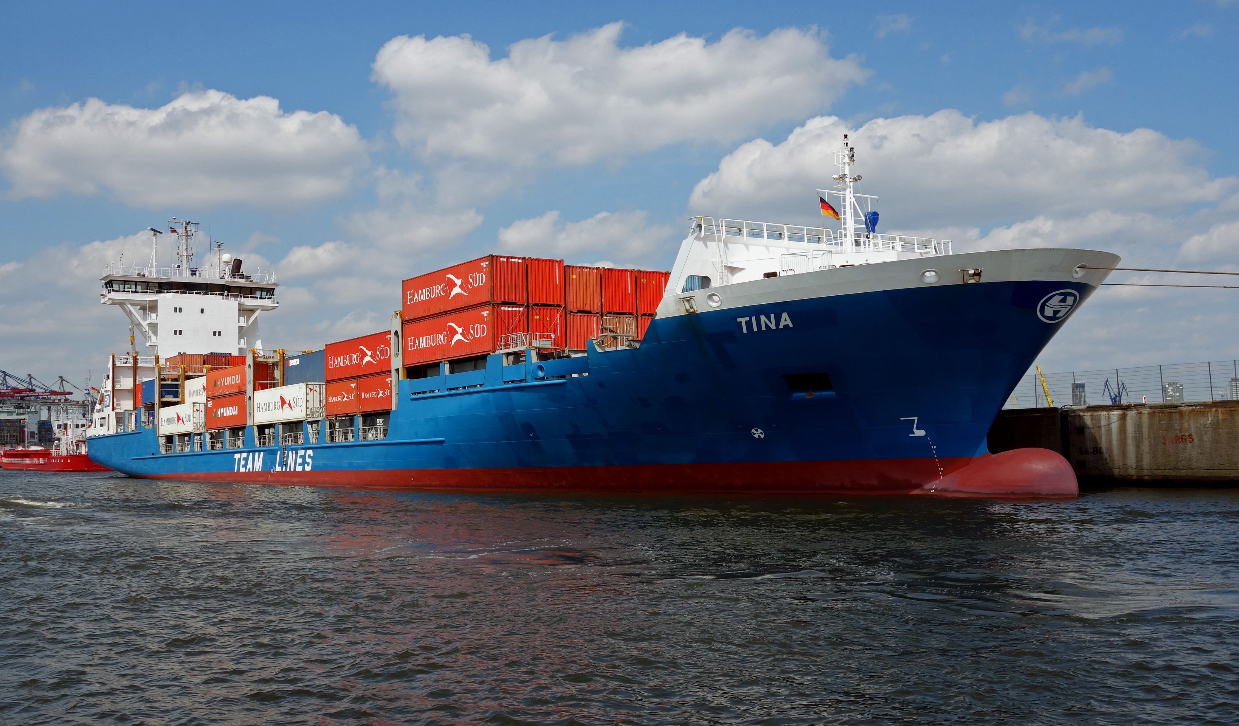 Die Tina im Hamburger Hafen. Es handelt sich um ein Containerschiff beim Containerzubringerunternehmen Team Lines. Das Schiff hat eine Länge von 138 Metern und wurde 2003 als Gotland in Betrieb genommen. This image was created with Hugin.